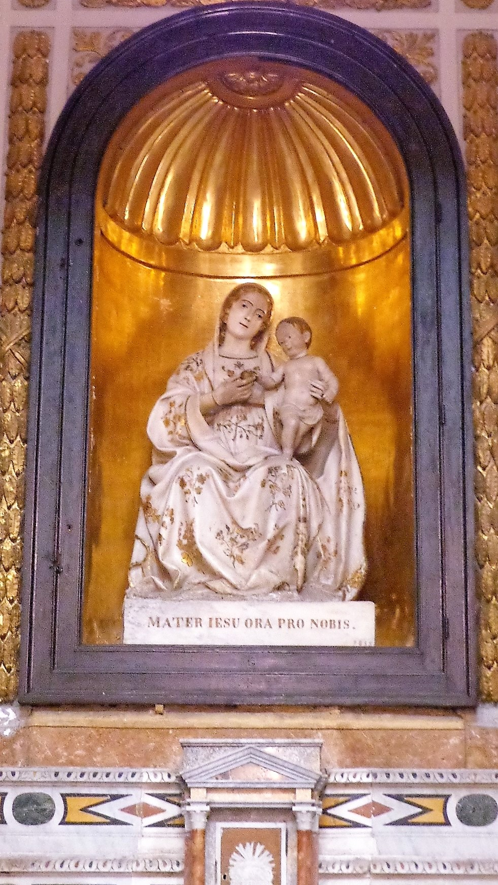 Vergine on bambino, statua marmorea di stile gaginesco.